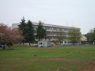 柏市立高田小学校校舎（南西側から）